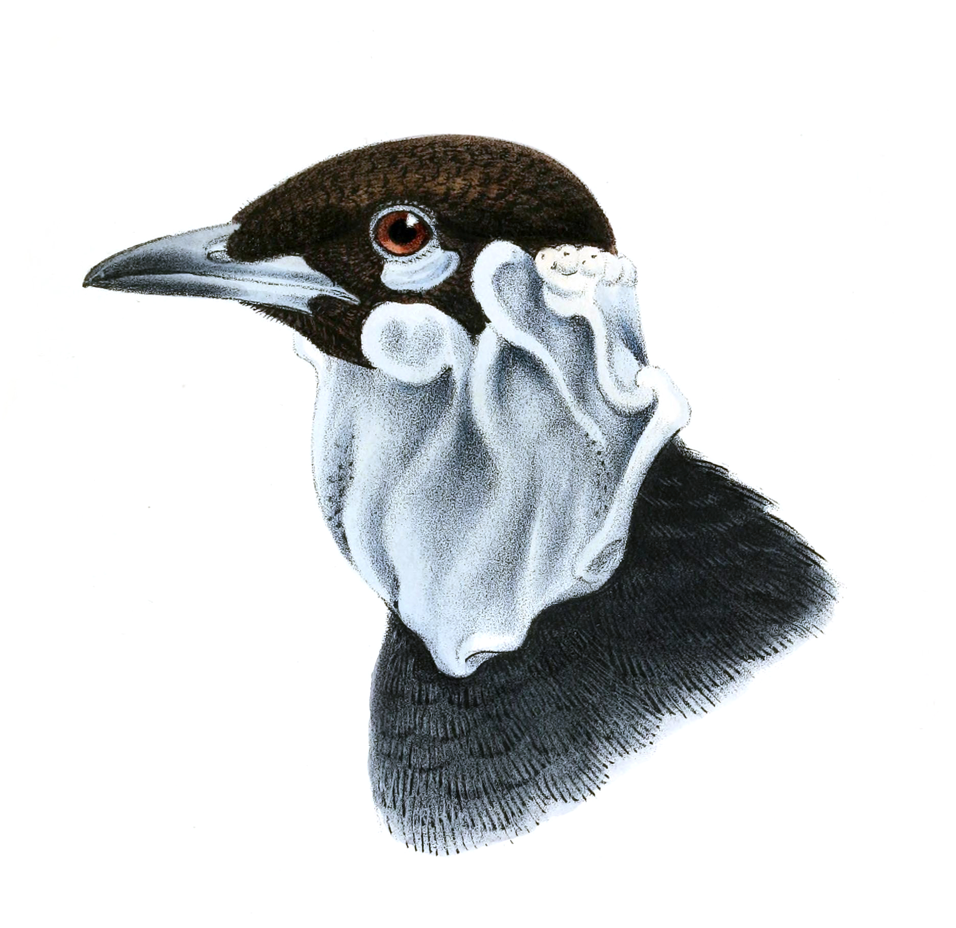 Gymnoderus foetidus head